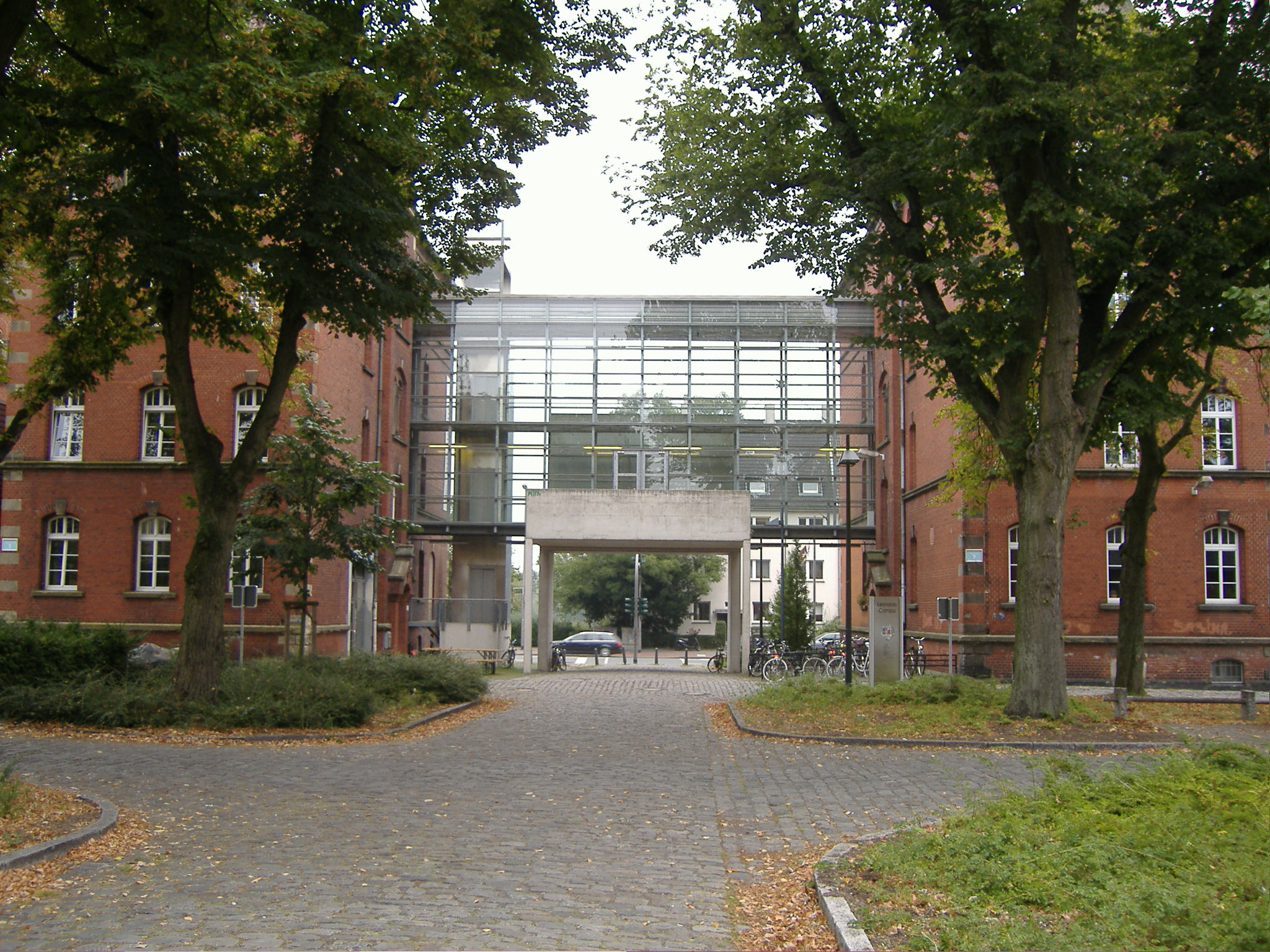 ehem. Reiterkaserne, 1898-1901 gebaut als Paradebeispiel preußischer Kasernenarchitektur, heute Teil der Fachhochschule Leonardo-Campus, Münster, Deutschland Tag des offenen Denkmals, Panoramafreiheit Foto: Elkin Fricke --Managementboy 11:48, 16 September 2005 (UTC)